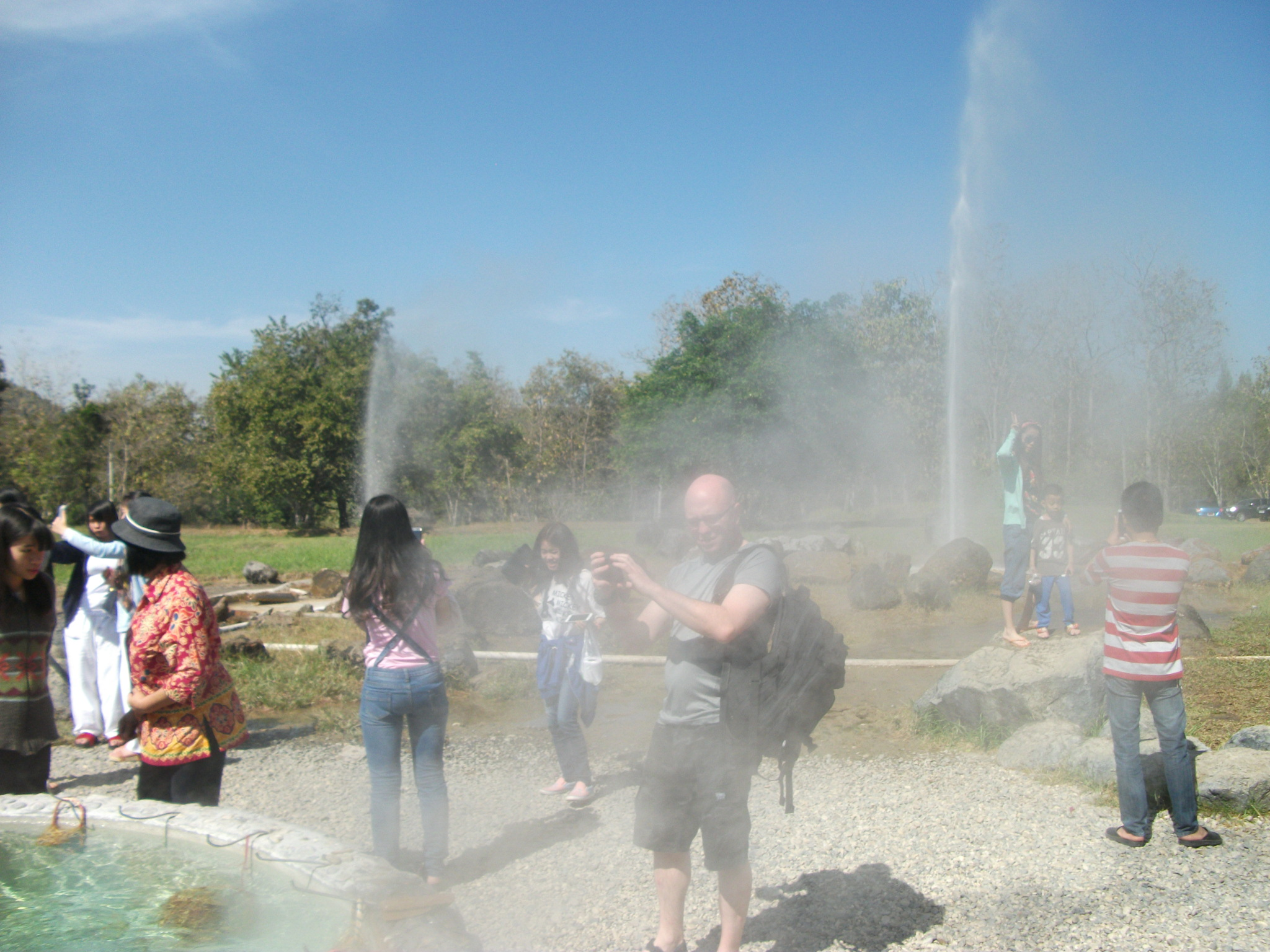 2016年1月10日サンカンペーンの源泉地で撮影。 奥の噴水が間断なき間欠泉。 手前に見えるのは卵を茹でる麻釜〔おがま〕